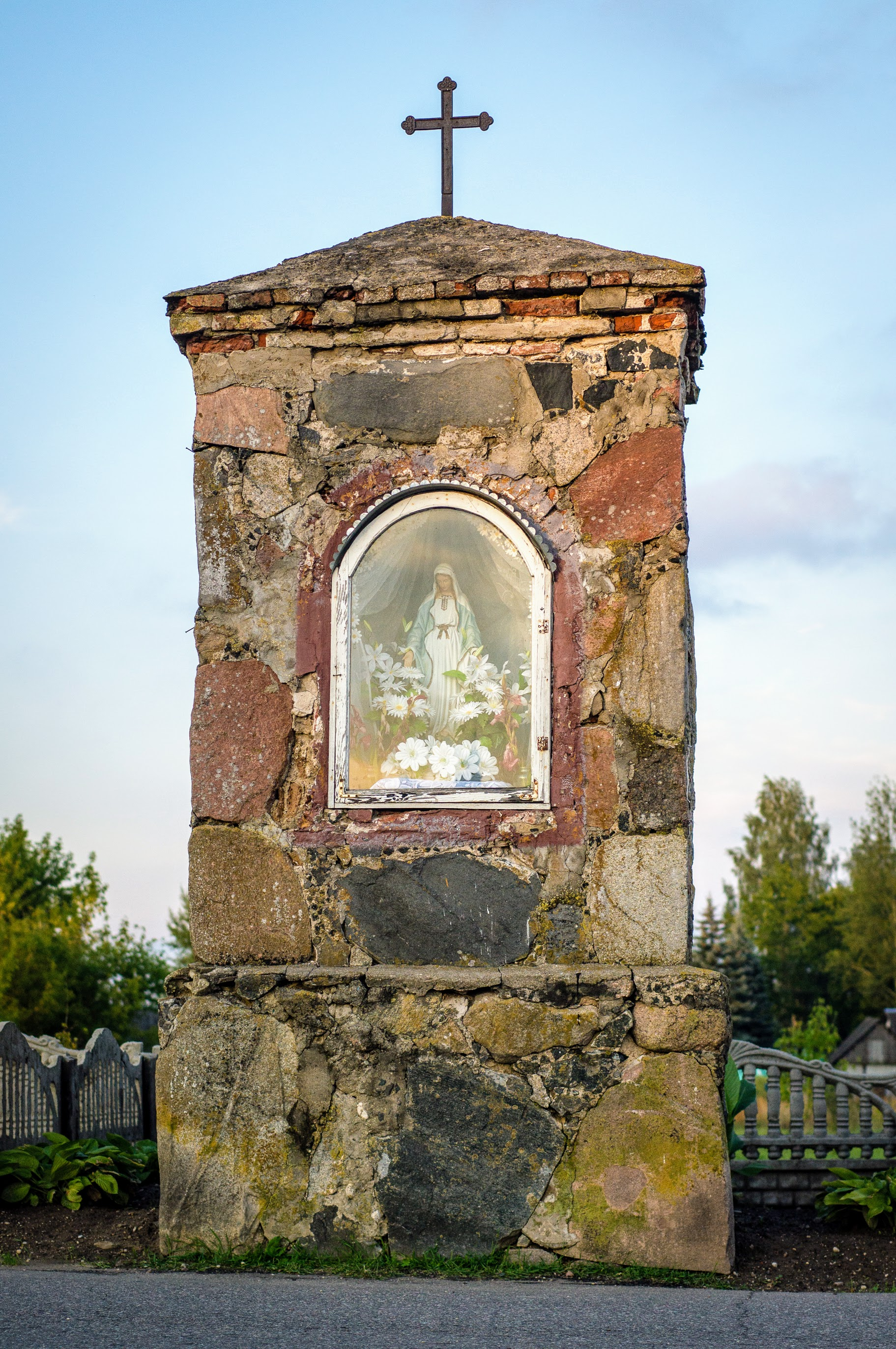 Капліца прыдарожная пачатку ХХ ст.